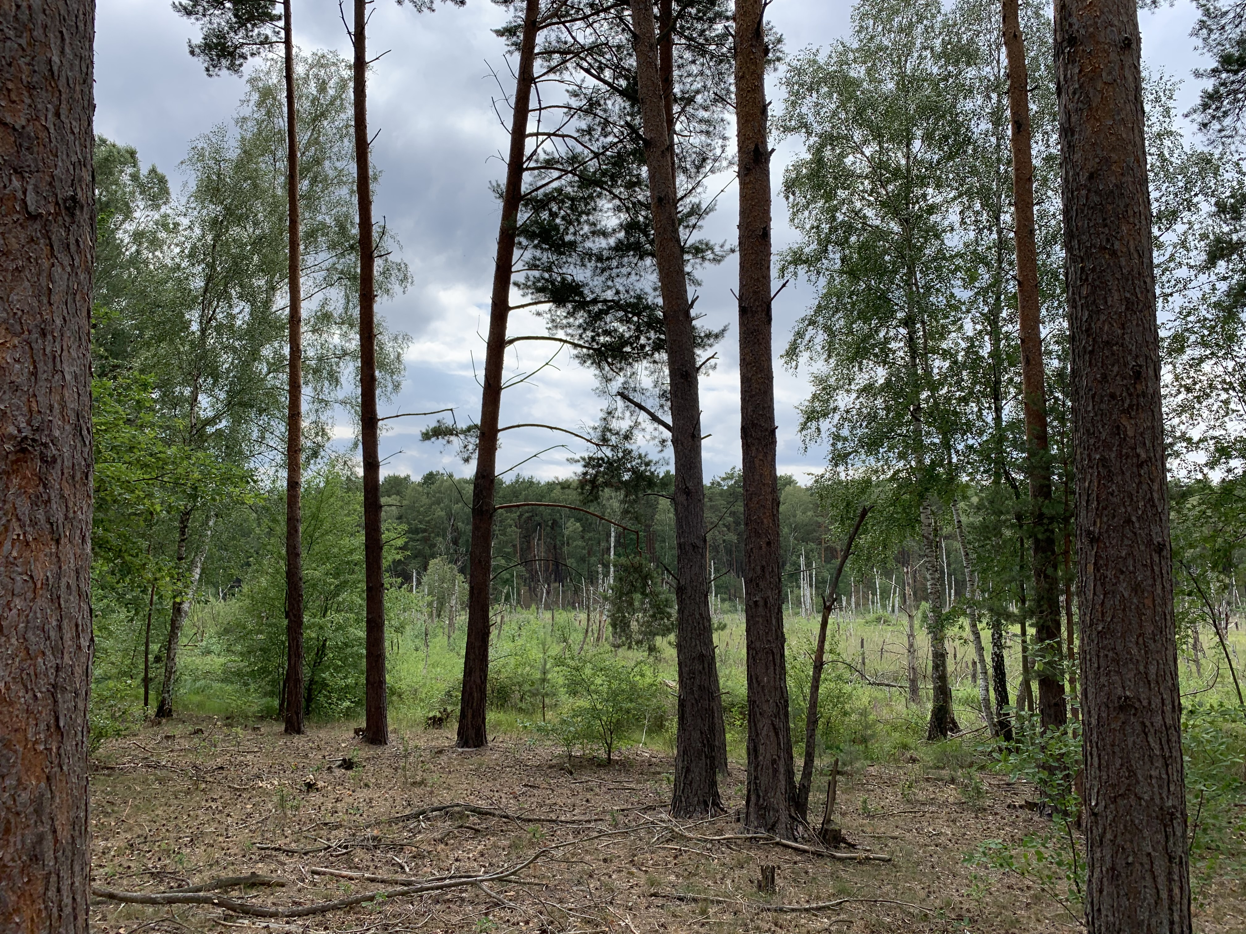 Naturschutzgebiet Kleine und Mittelleber in Teupitz-Egsdorf in Brandenburg